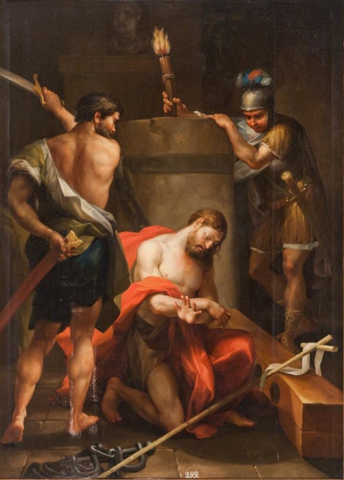 La obra representa la decapitación del profeta San Juan Bautista, precursor del Mesías.